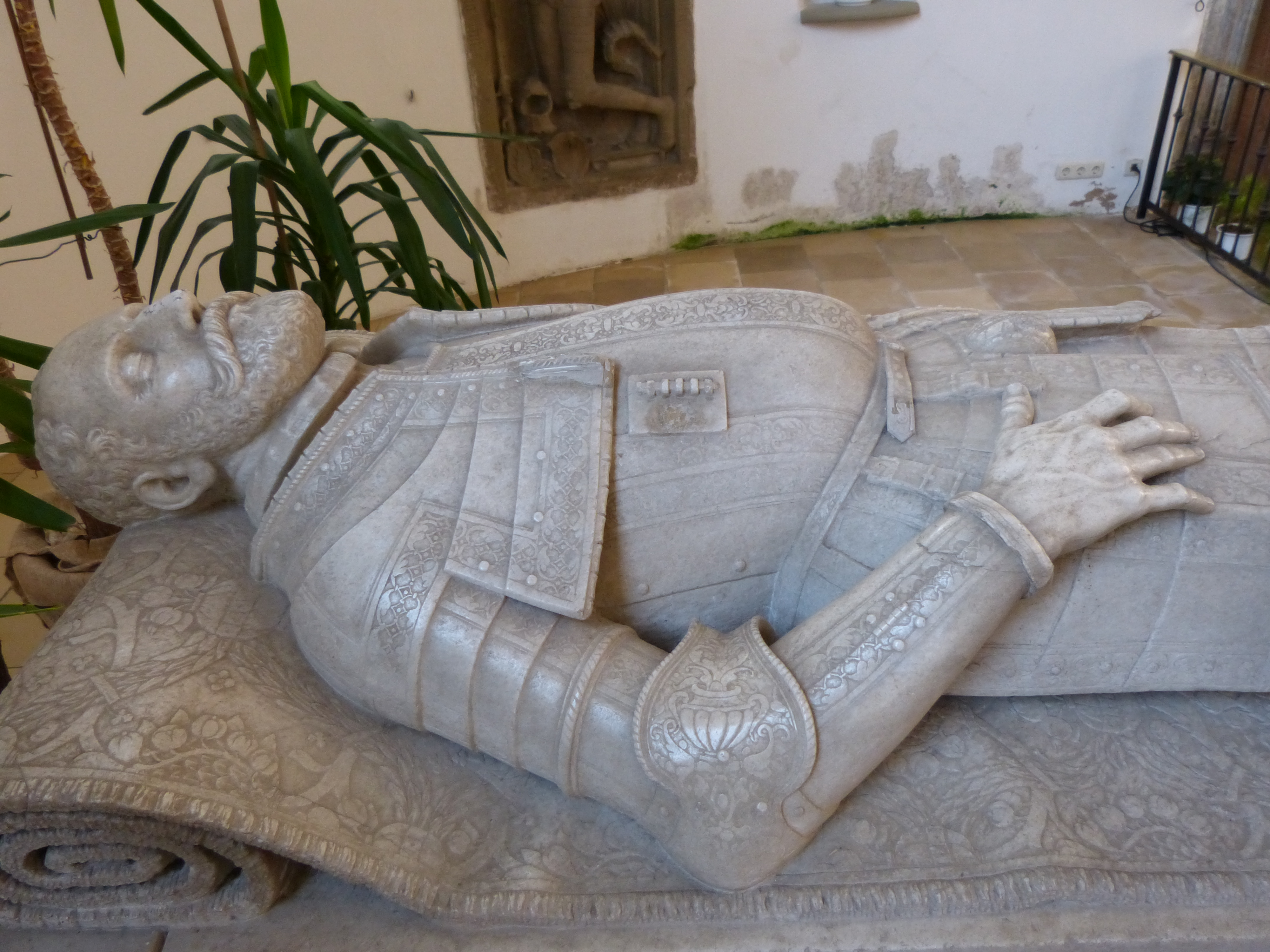 St. Peter und Paul, Kirchheim in Schwaben, Landkreis Unterallgäu, Bayern